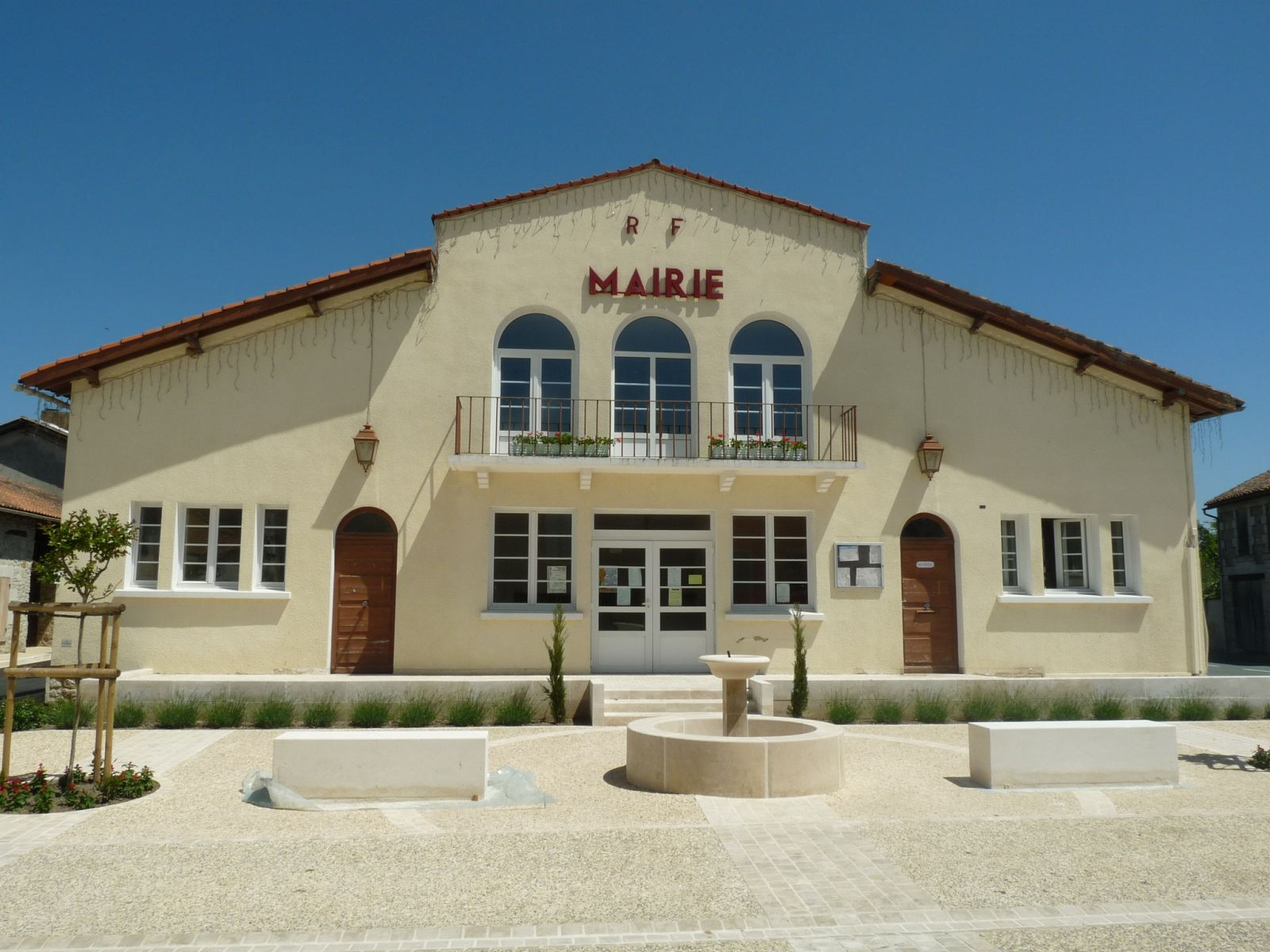 mairie de Parcoul, Dordogne, France